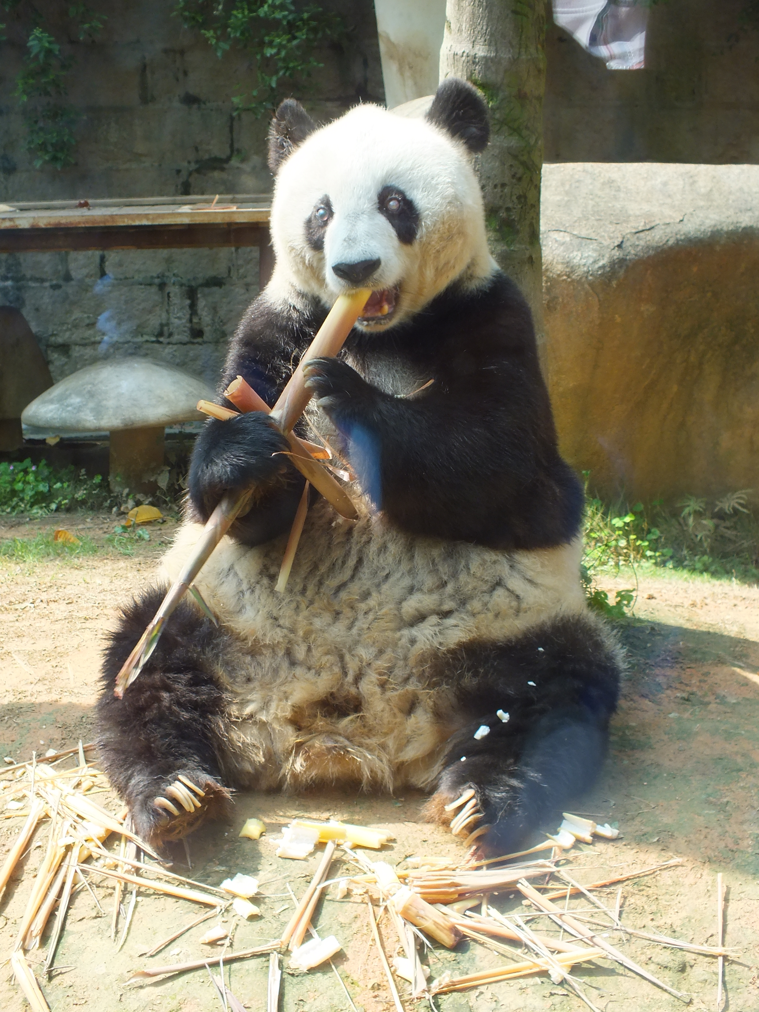 中文（中国大陆）: 熊猫巴斯表演吃竹子